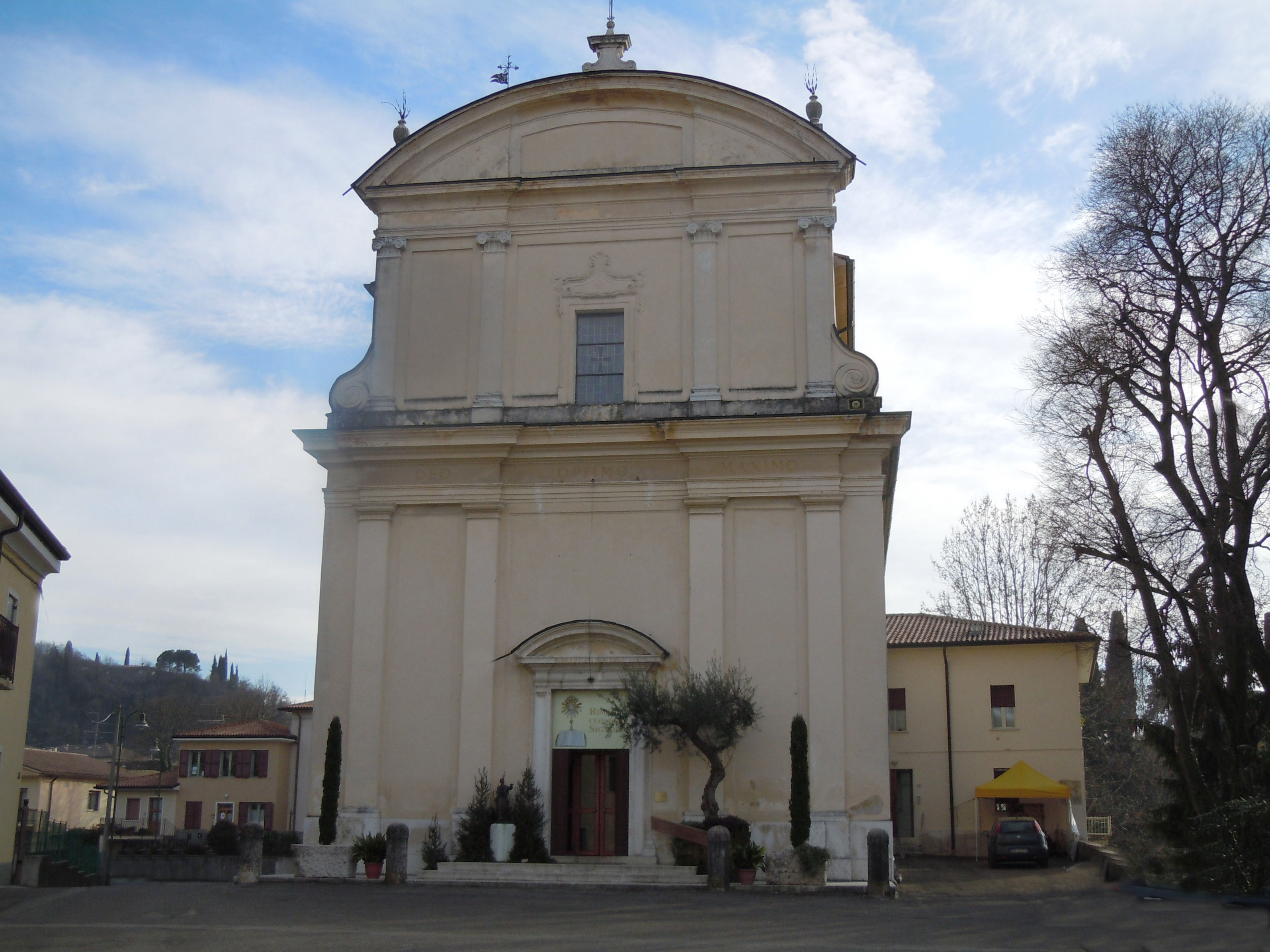 Pastrengo, chiesa parrocchiale dell'Esaltazione della Santa Croce .